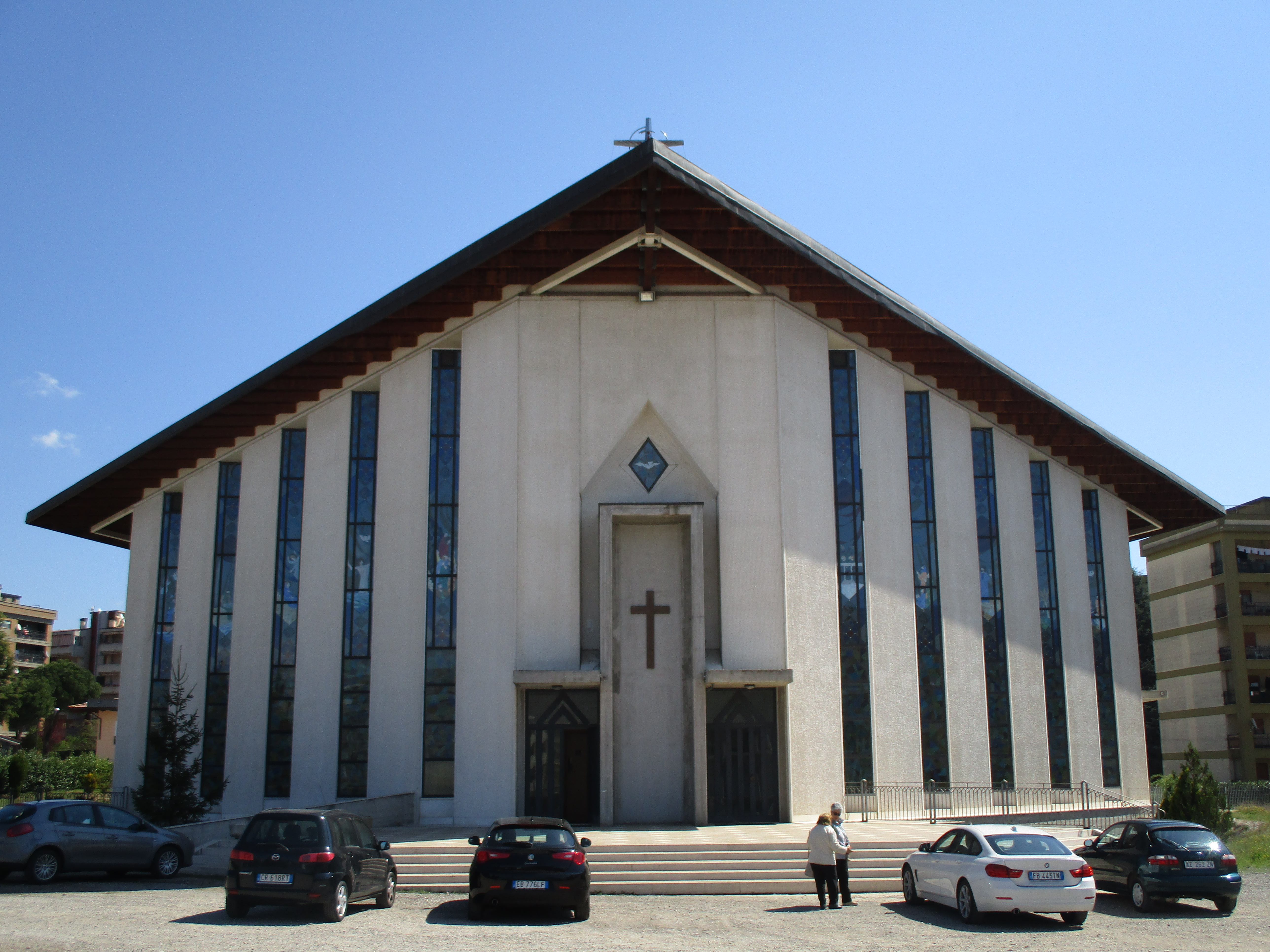 Facciata della chiesa dello Spirito Santo